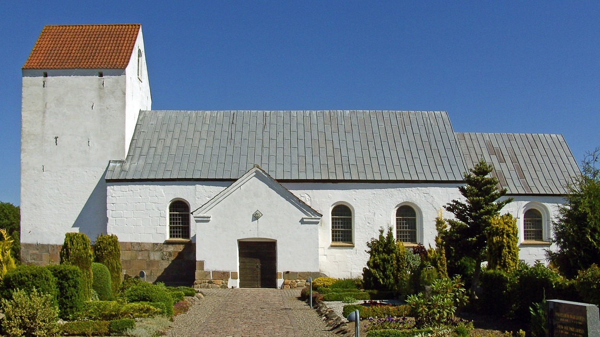 fra syd